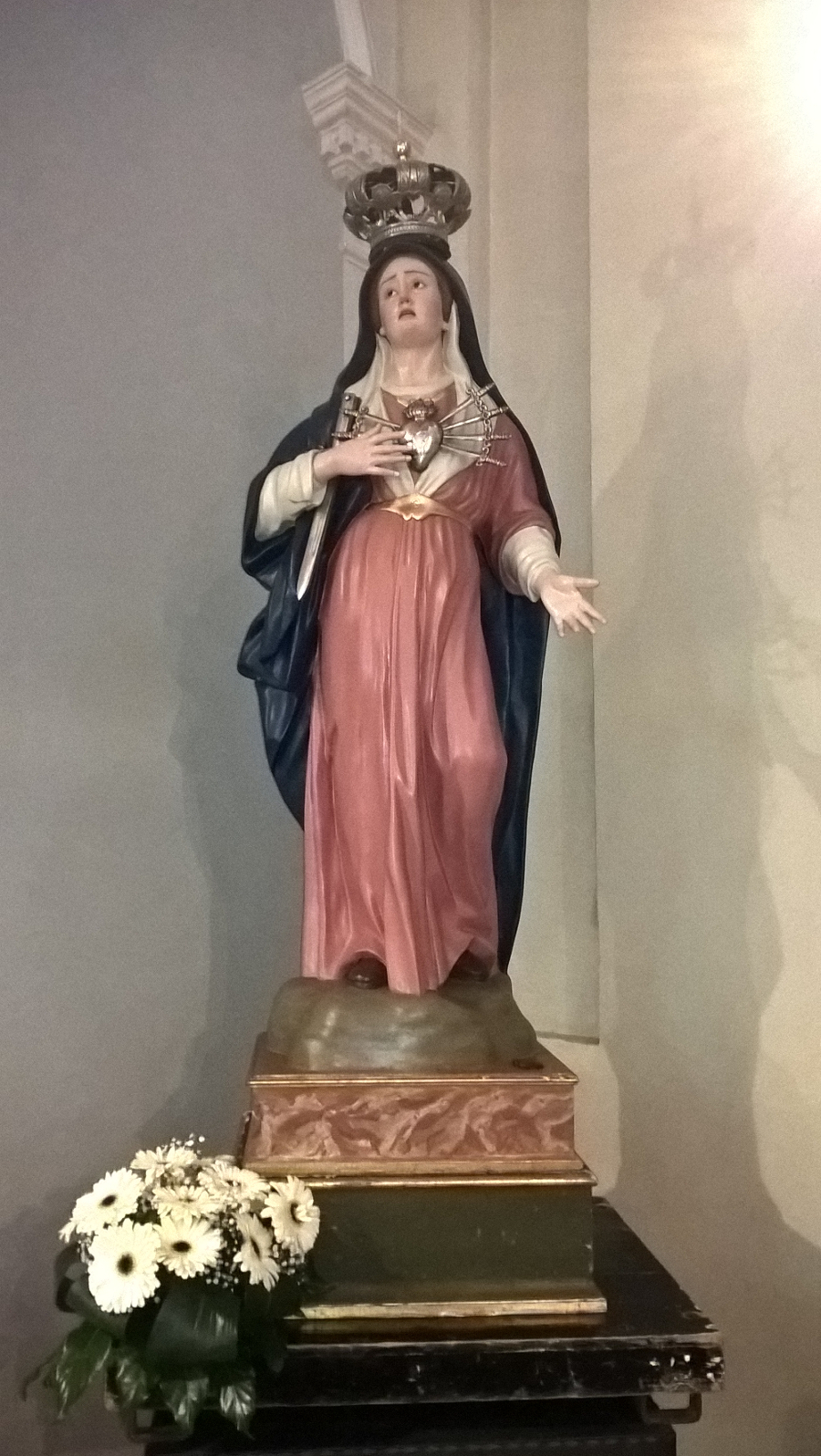 Maria SS. Addolorata - statua in chiesa S.Nicola V. in Ceppaloni (sec. XIX)